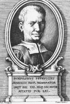 Pandolfo Petrucci (Reg.Zeit von 1487-1512), Außenpolitiker der Republik Siena im 15. Jh., Kupferstich, mit lat. Inschrift, es zeigt ihn im Alter von 61 J.